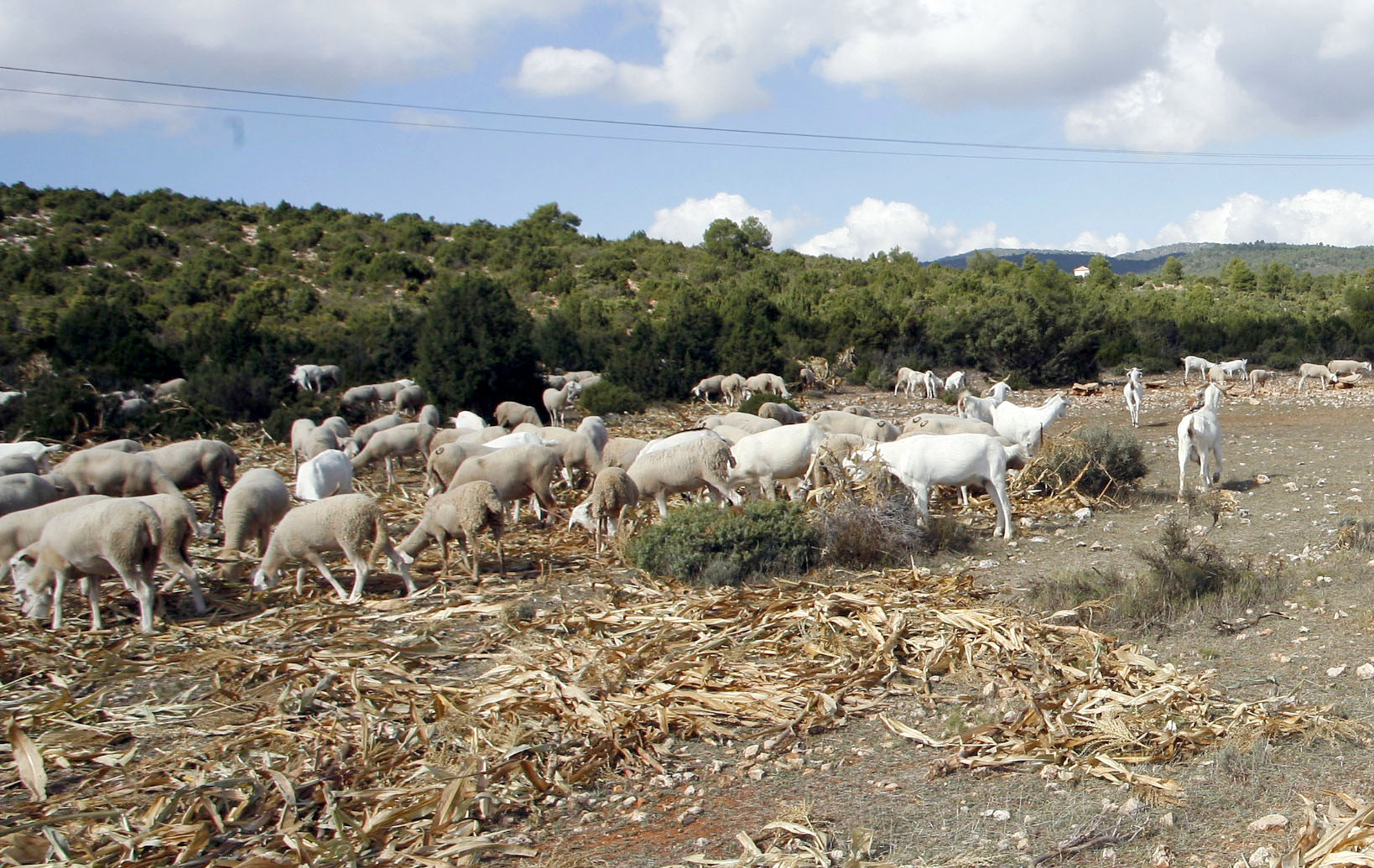 Rebaño de cabras celtibéricas en Castilla-La Mancha